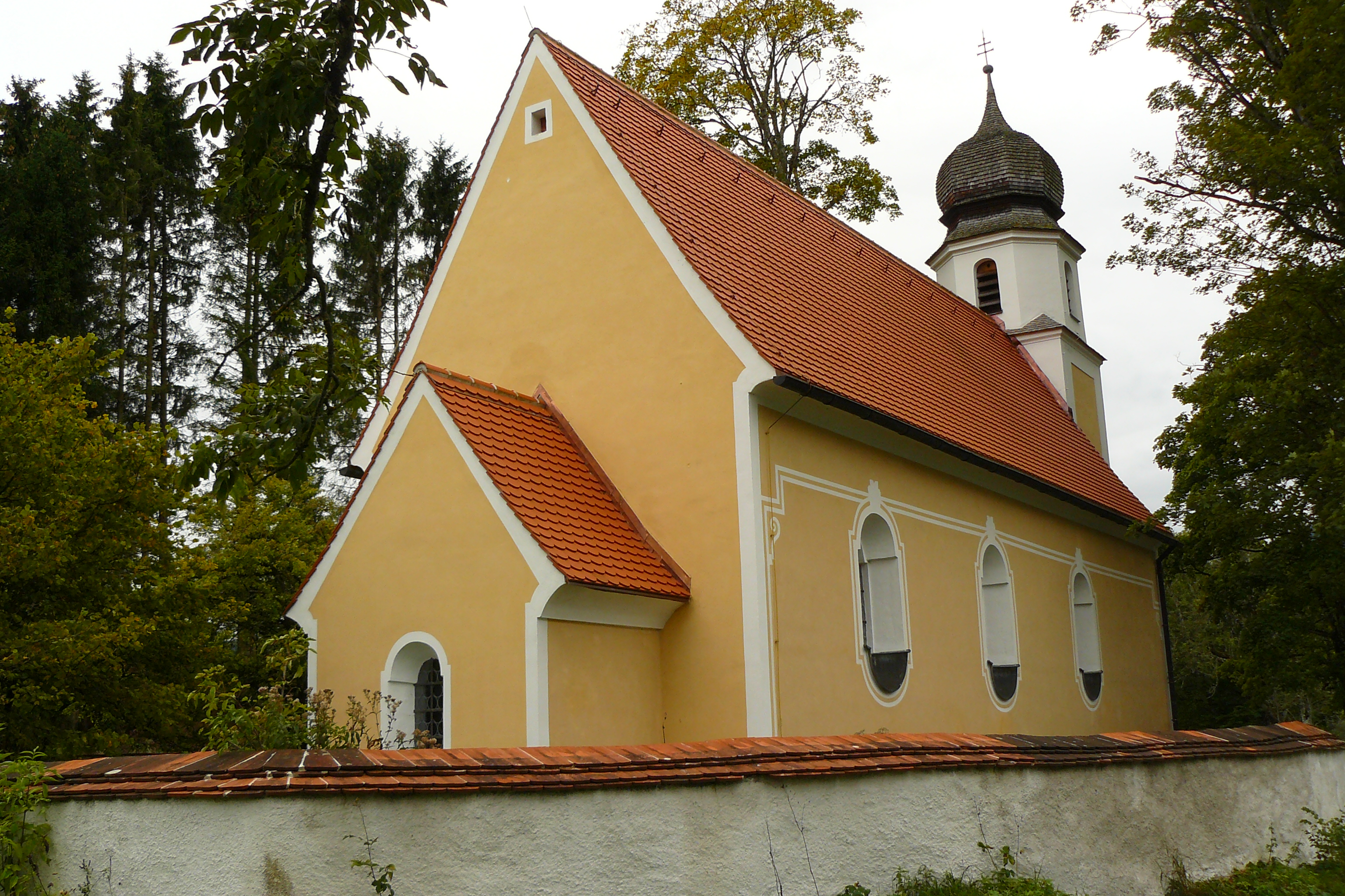 Baudenkmal, Sankt Margareth mit Einfriedung, Zwergern 5This is a photograph of an architectural monument.